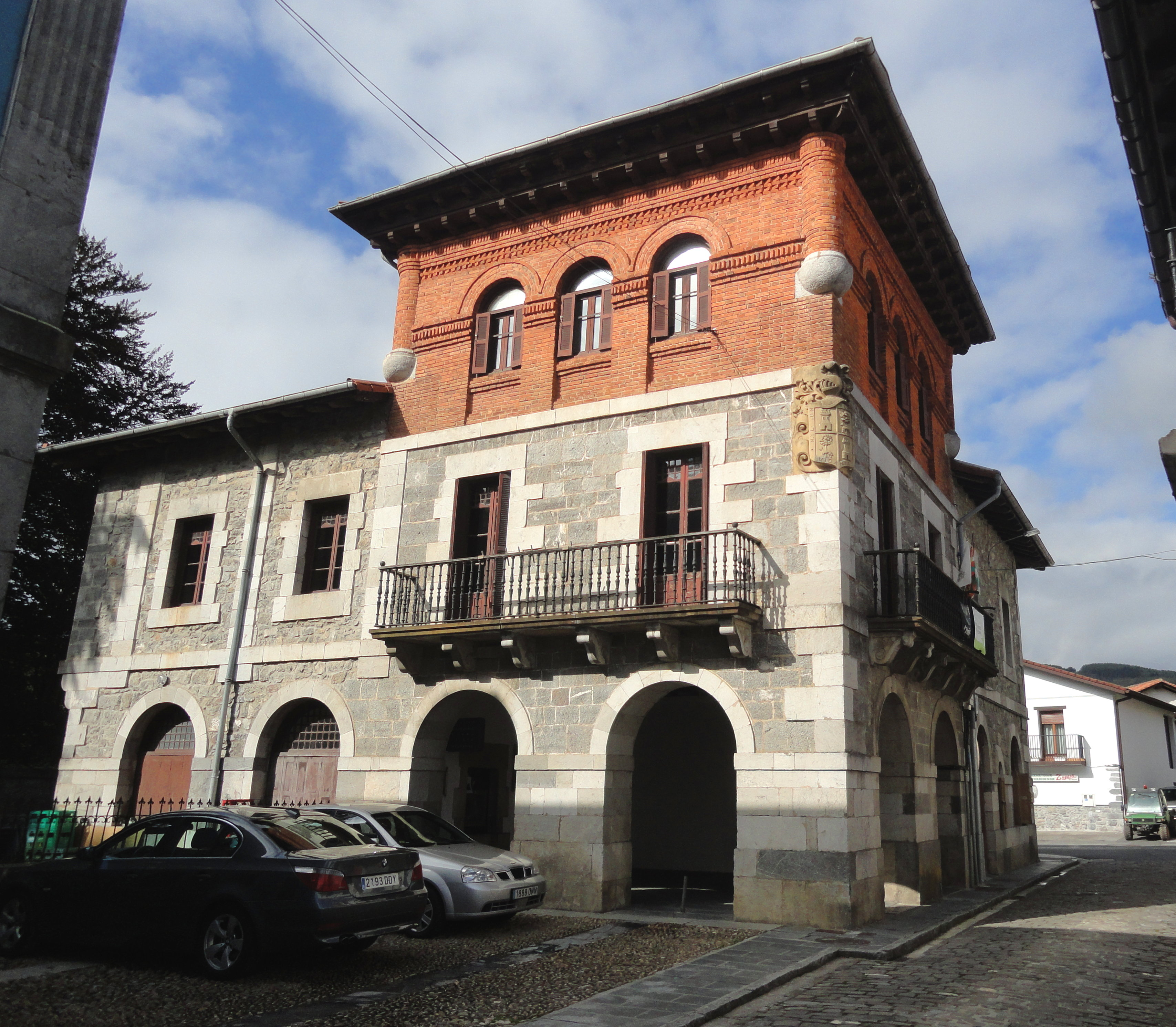 Bidaniako udaletxea